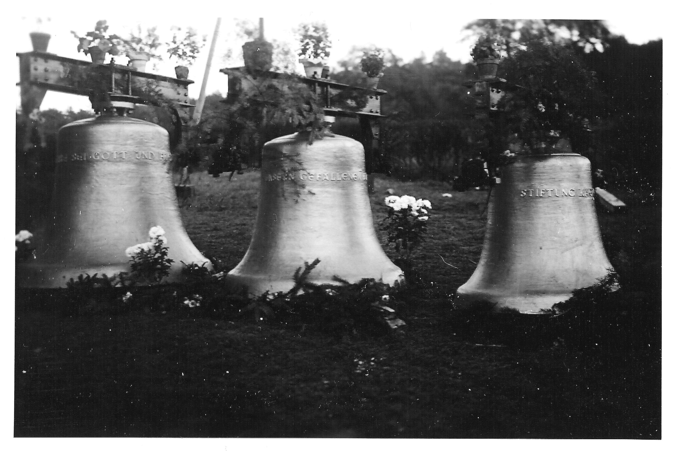 Die Drei neuen Glocken der Genheimer ev. Kirche bei ihrer Segnung. Die Glocken wurden am xx.xx.1930 in die Kirche eingebaut und sind seit dem dort in Gebrauch.